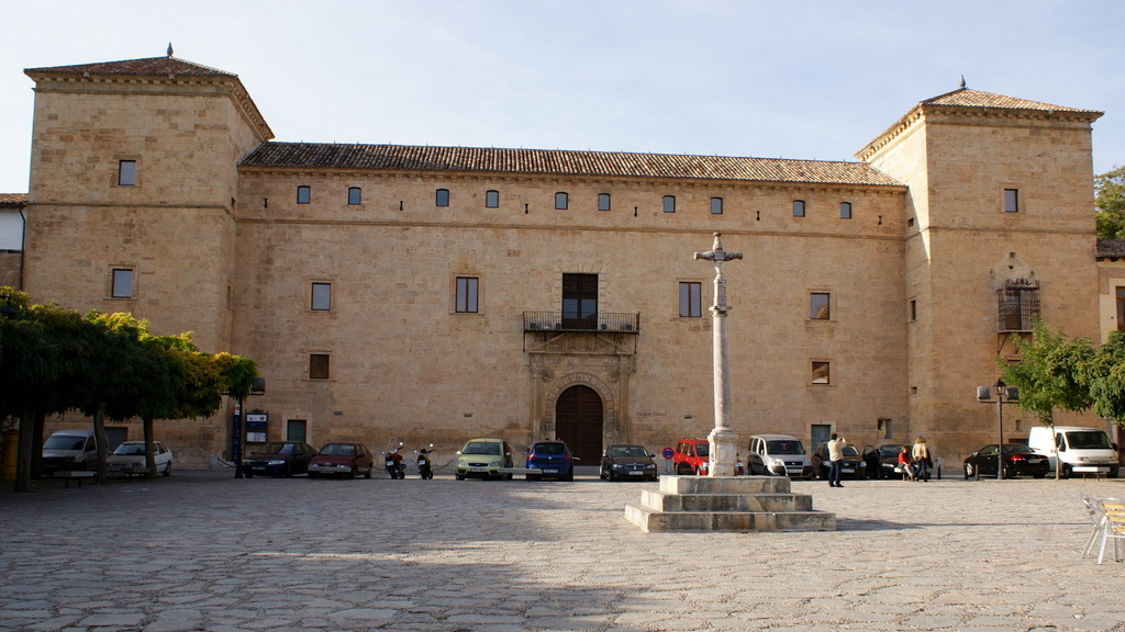 Palacio Ducal de Pastrana de estilo renacentista, fue proyectado en el siglo XVI. Es famoso por el echo de haber tenido encerrada a la Princesa de Éboli, prisionera en su propia casa, por su primo el rey Felipe II. Pastrana, Guadalajara, Comunidad Autónoma de Castilla-La Mancha